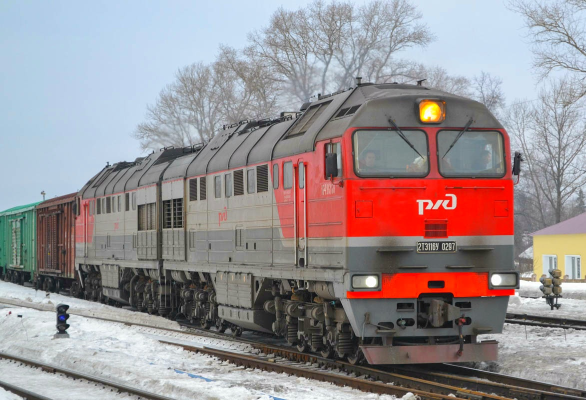 С завода поступил в депо Дно В декабре 2017 г. передан в ТЧЭ-26 Кемь